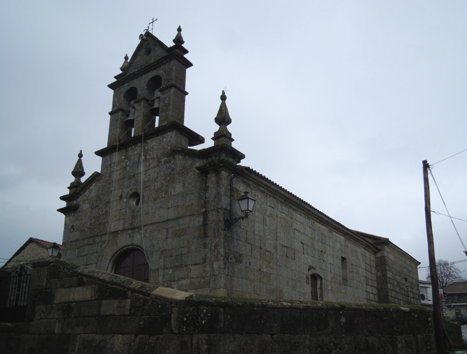 Igrexa parroquial de san Miguel de Vilardevós.